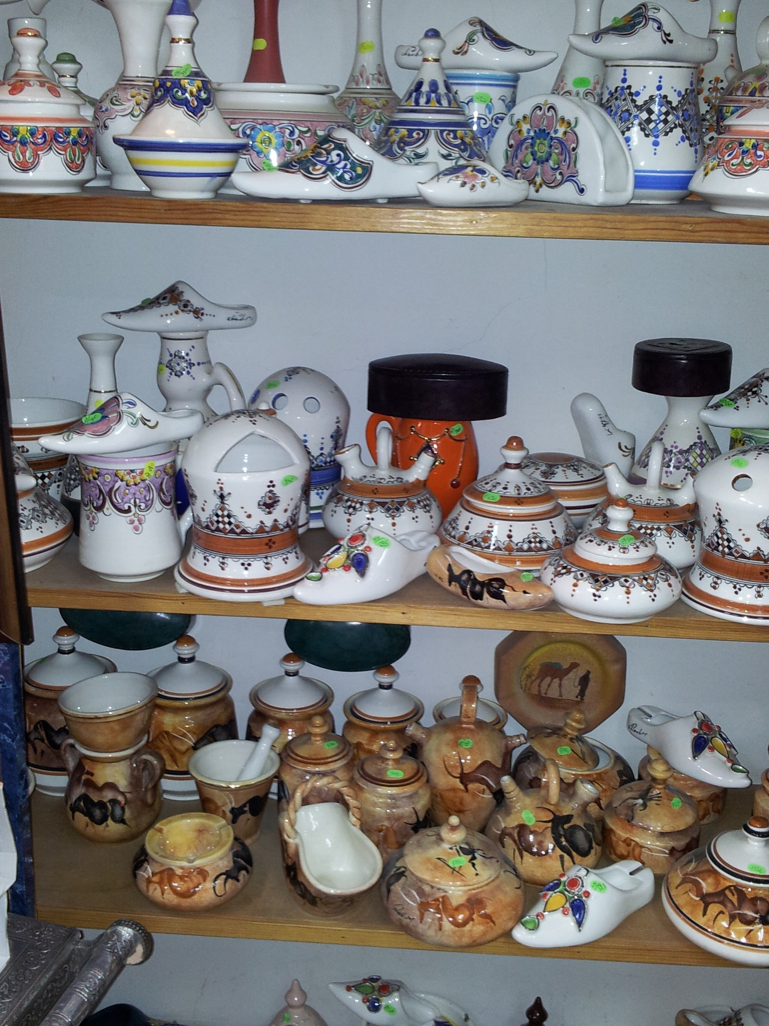 Poterie (Artisanat algérien)